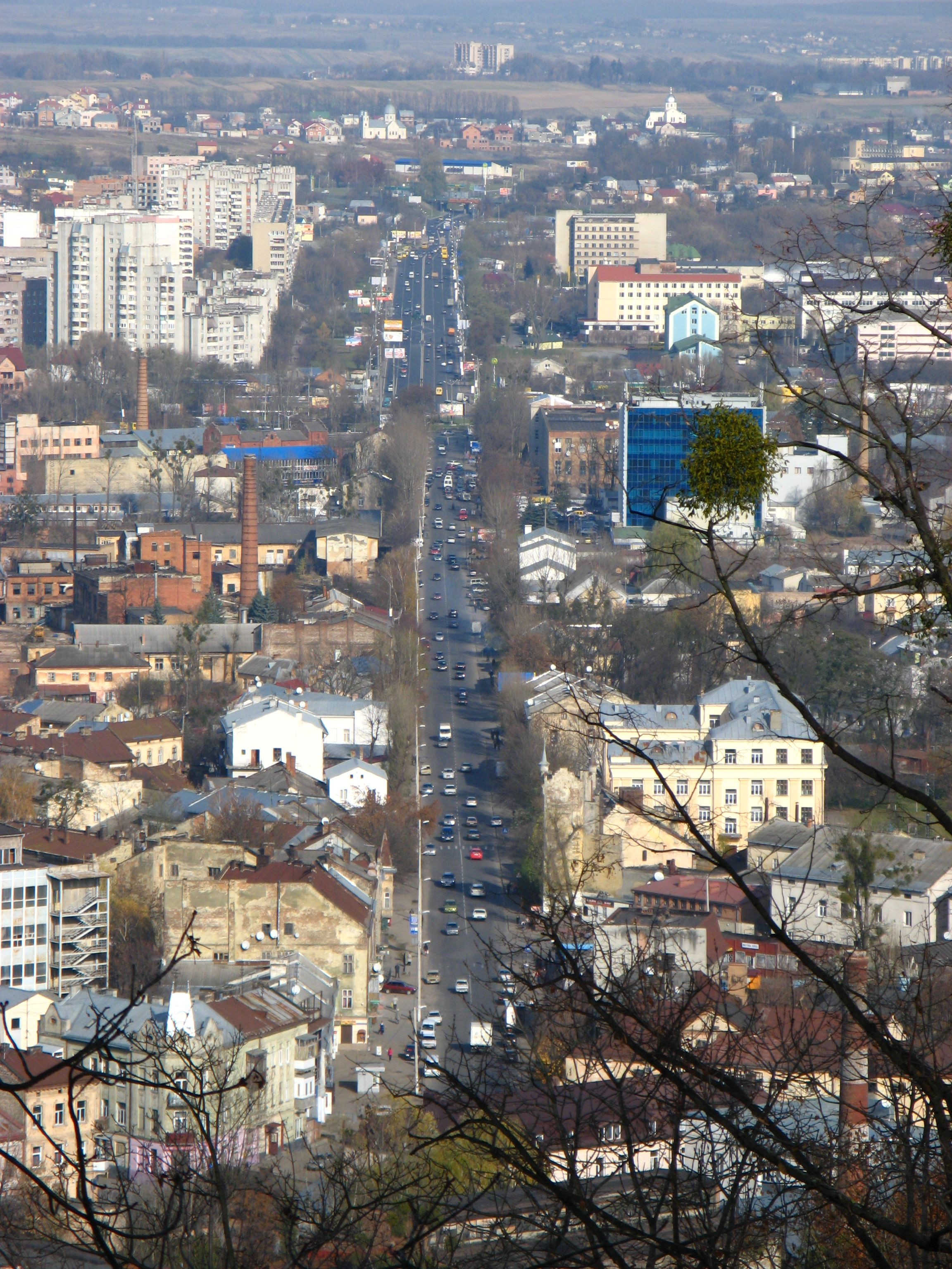 вул. Б. Хмельницького (Львів)